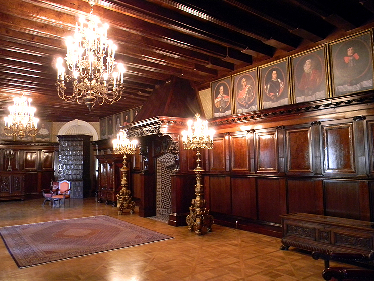 Sala komnikowa. Zamek w Nieświeżu